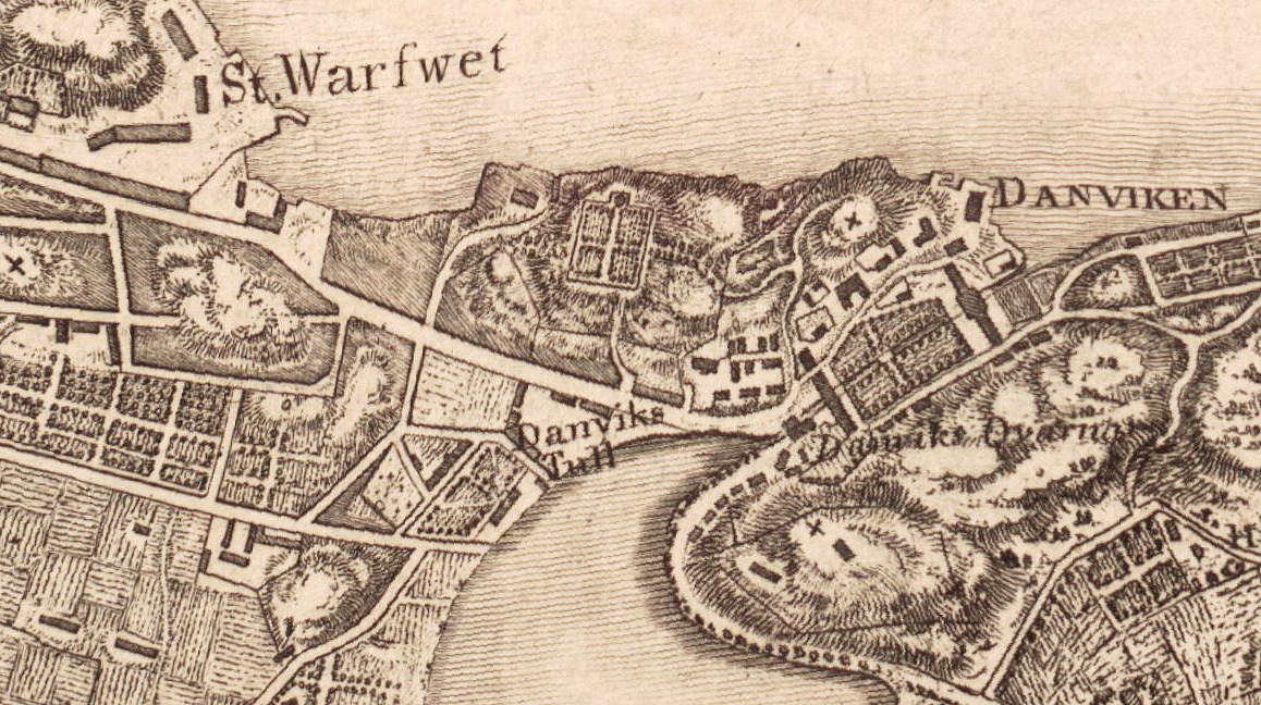 Del av karta över Stockholm visande dagens Danvikstull med omgivning